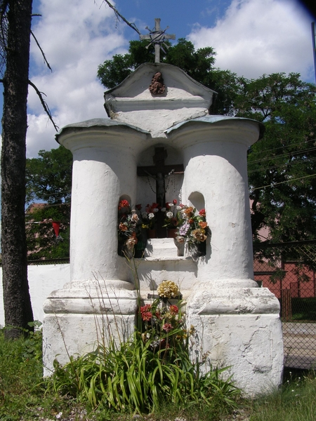 Grajewo - kapliczka przydrożna z ok. poł. XIX w. przy narożniku ulic Konopskiej i Piłsudskiego